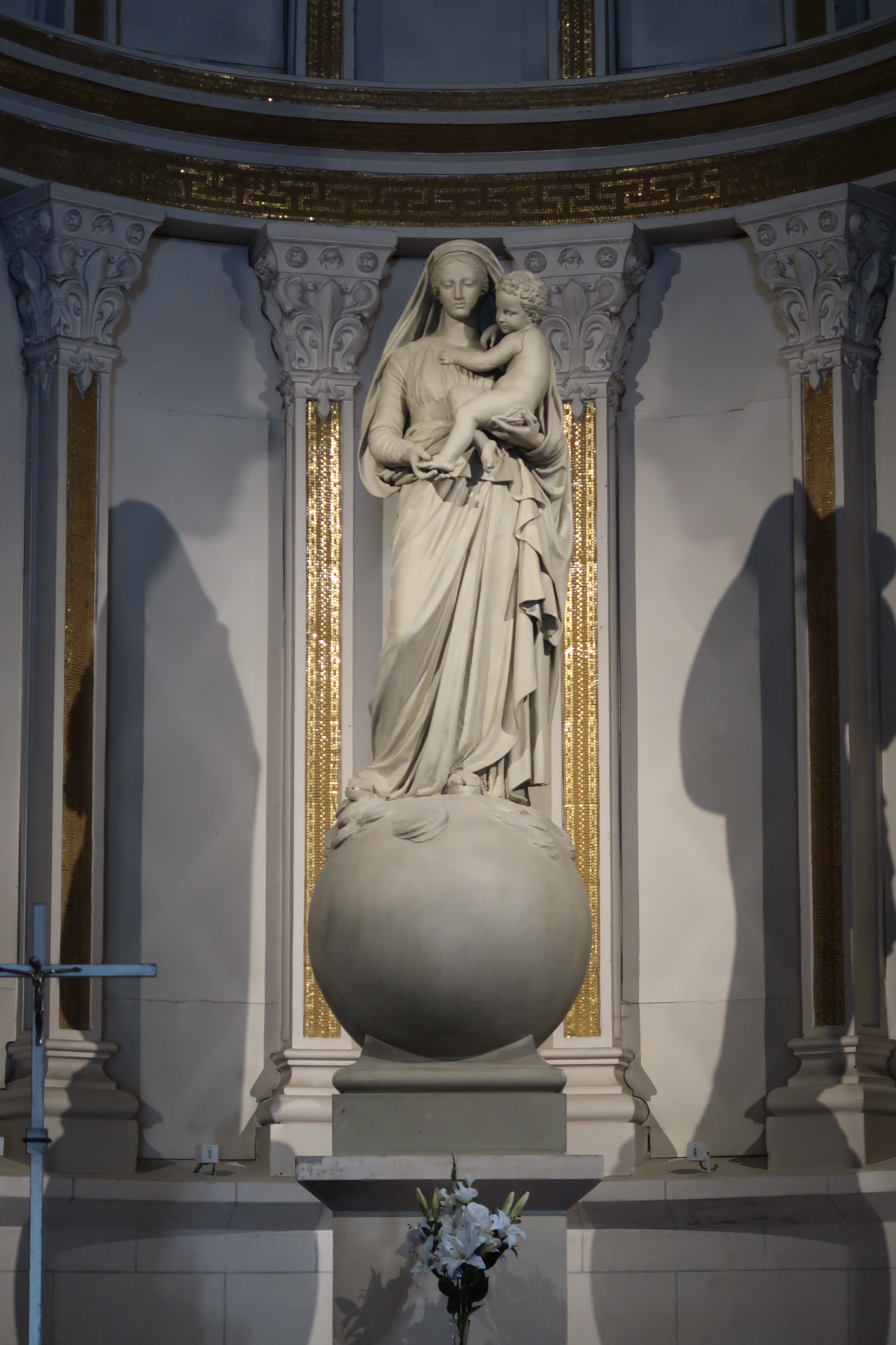 Statue de vierge à l'enfant dans l'église du Cœur-Immaculé-de-Marie de Suresnes (Hauts-de-Seine).